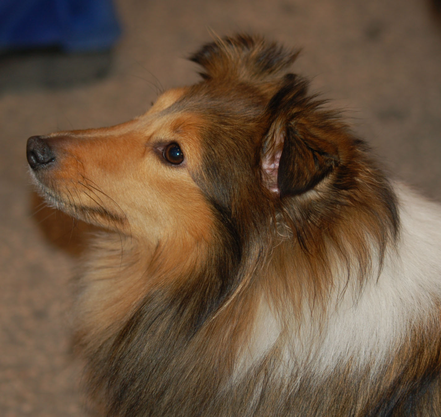 Głowa_owczarka_szetlandzkiego